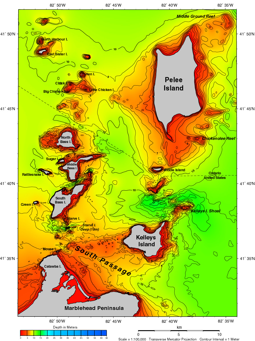 Islands in Lake Erie